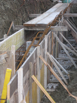 Cassero